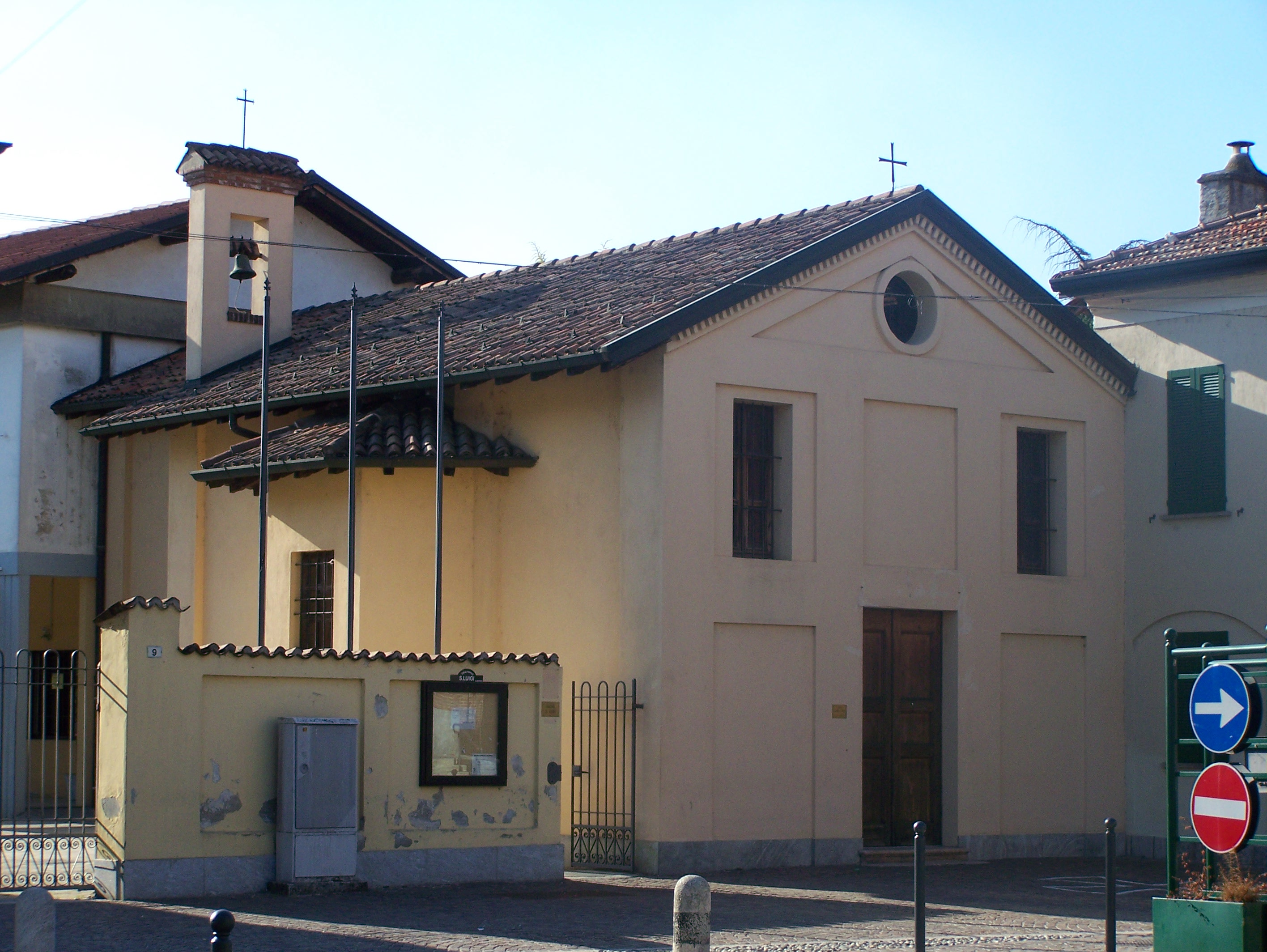 Chiesa di Santa Maria De Bozzis ad Albairate (MI) - Italy